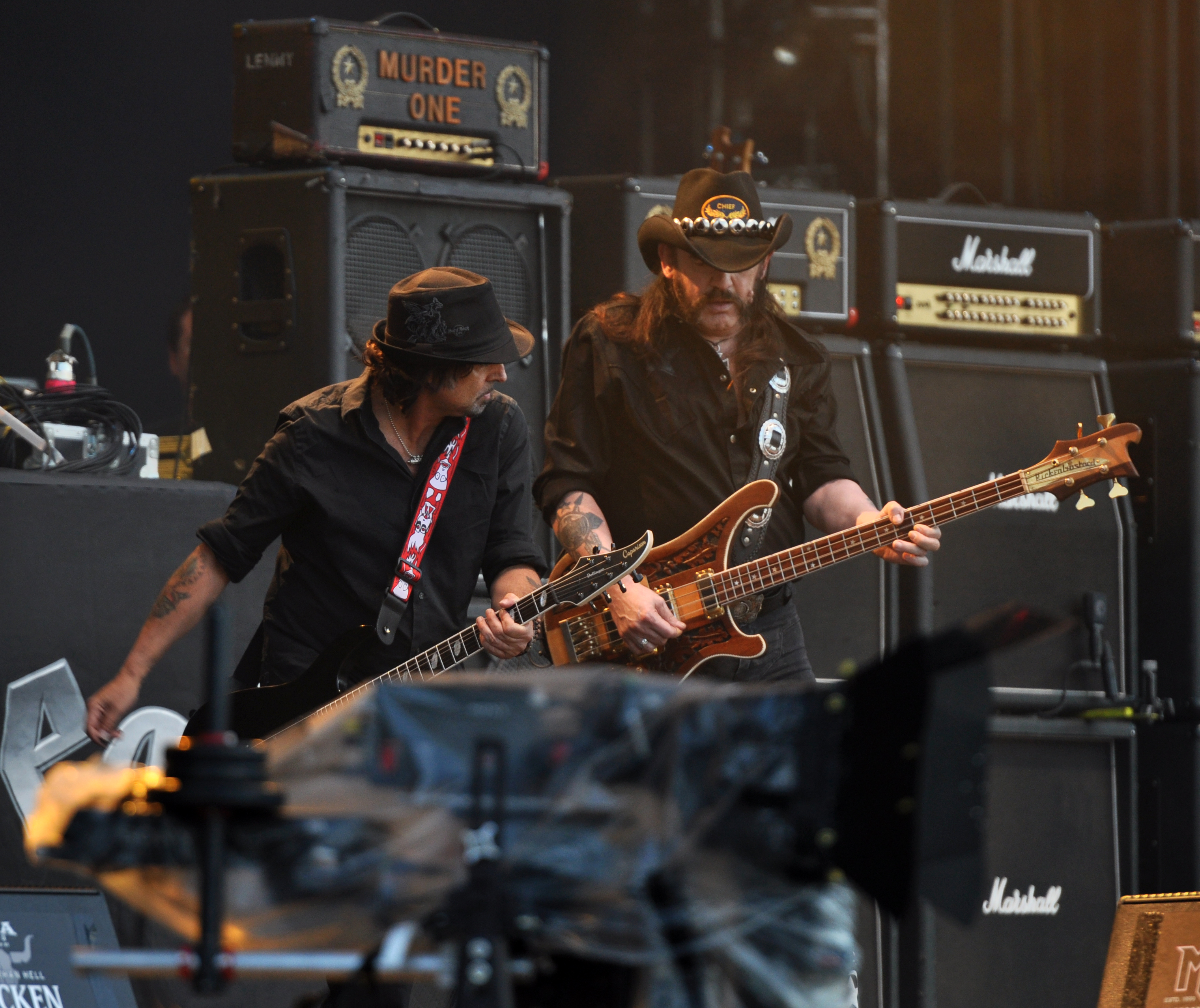 Motörhead at Wacken Open Air 2013